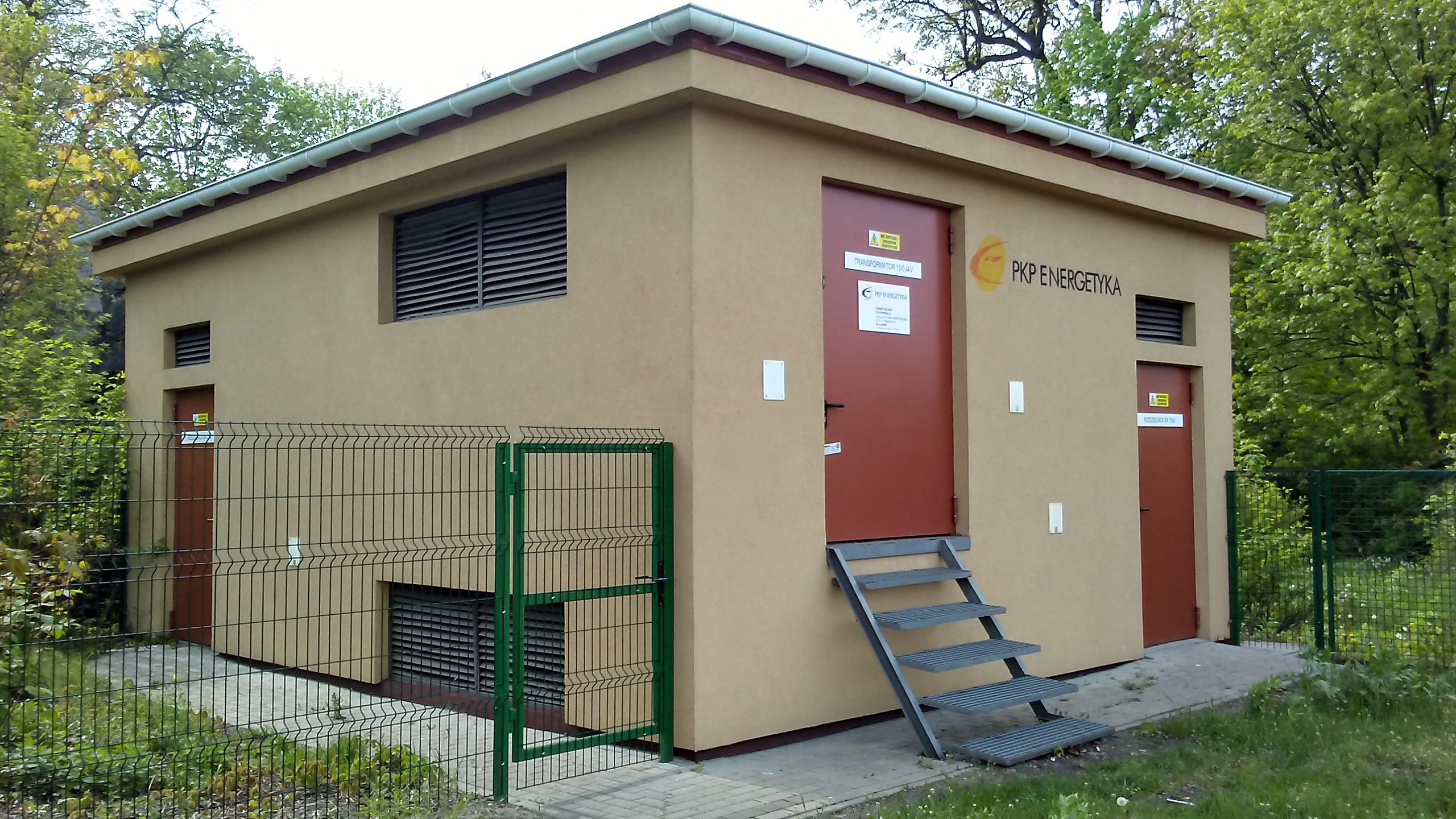 Tomaszów Mazowiecki w województwie łódzkim, PL, EU. Transformtor PKP Energetyka na stacji kolejowej Tomaszów Mazowiecki. CC0